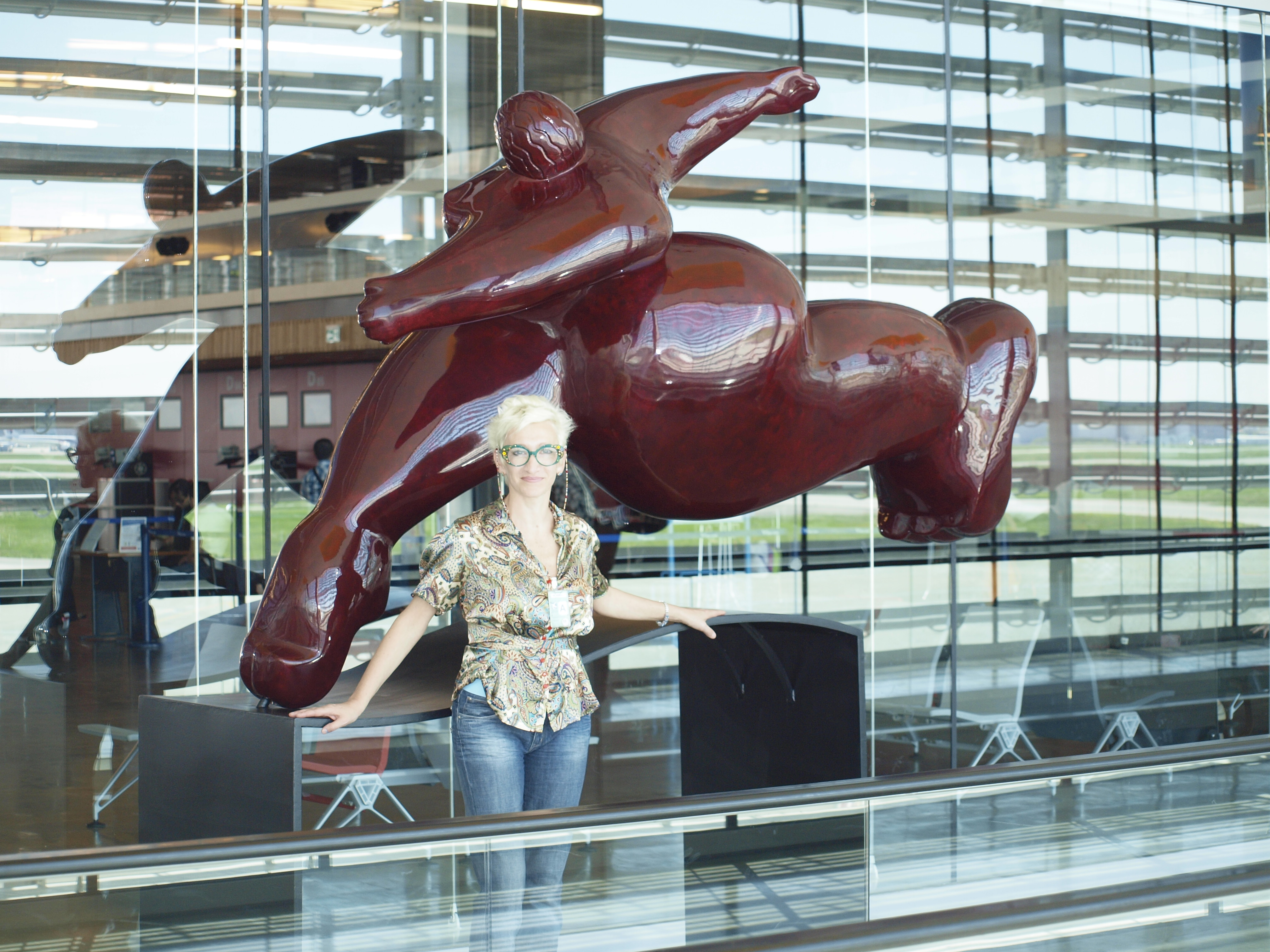 statue bronze